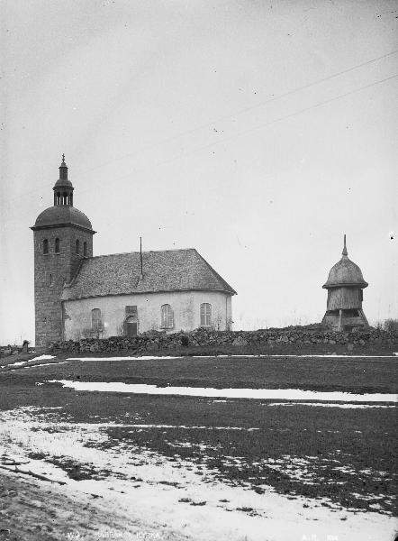 Kyrkan och klockstapeln från söder. Kategori: (01) ExteriörerKyrkan och klockstapeln från söder.